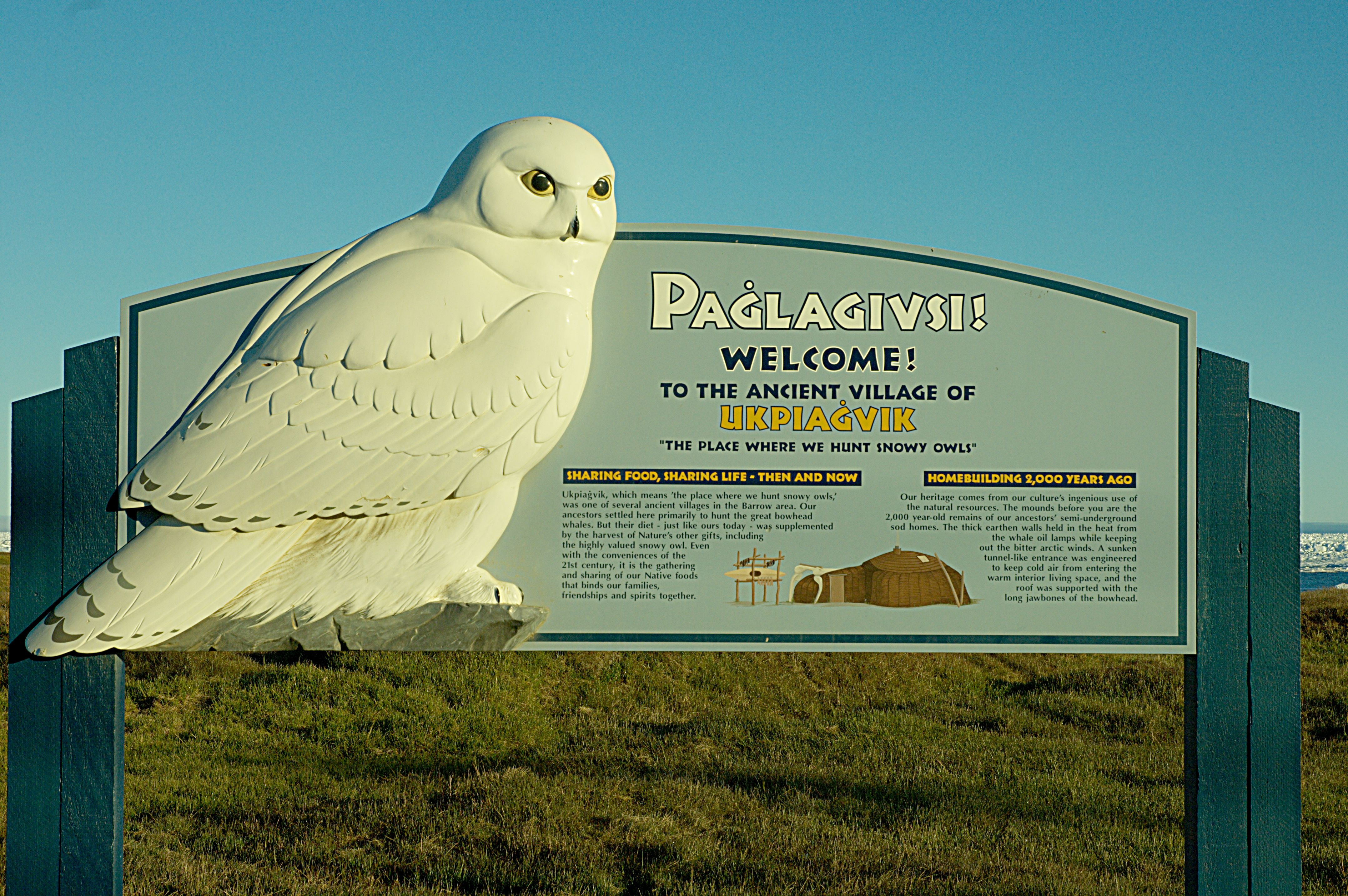 Paglagivsi sign in Barrow Alaska